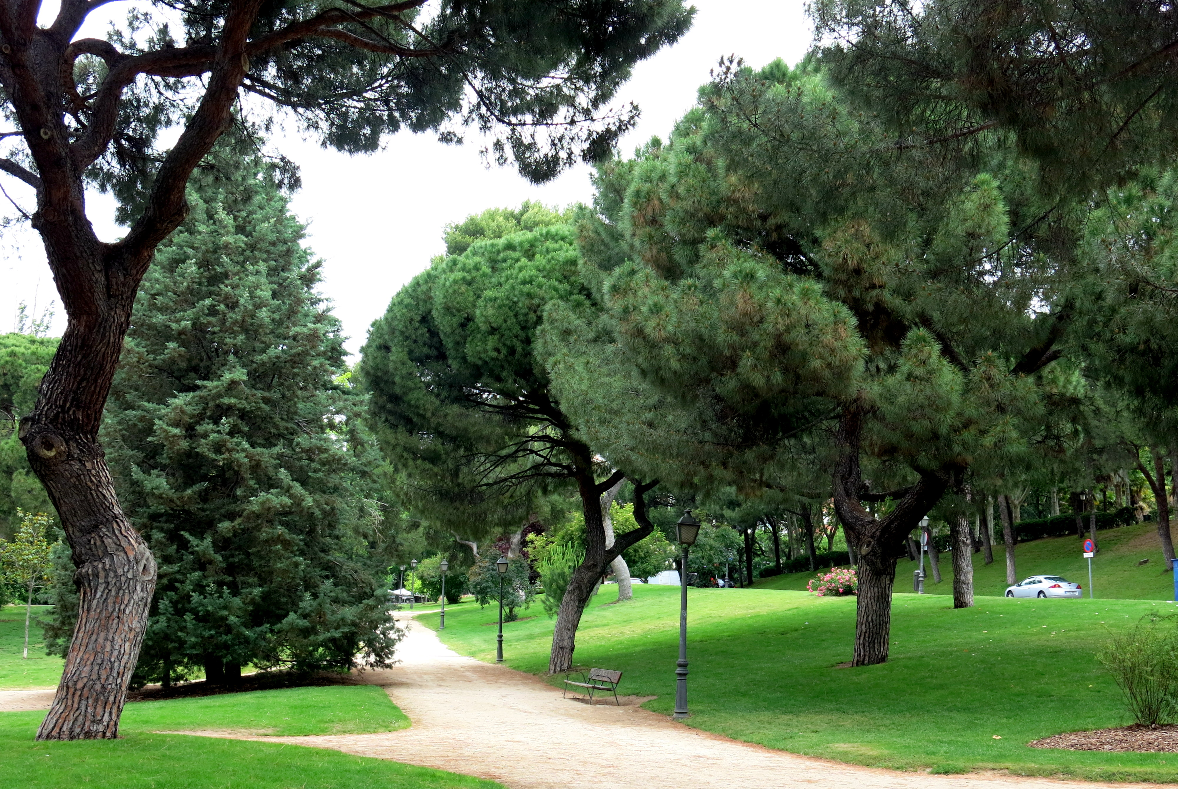 Madrid: parque del Oeste